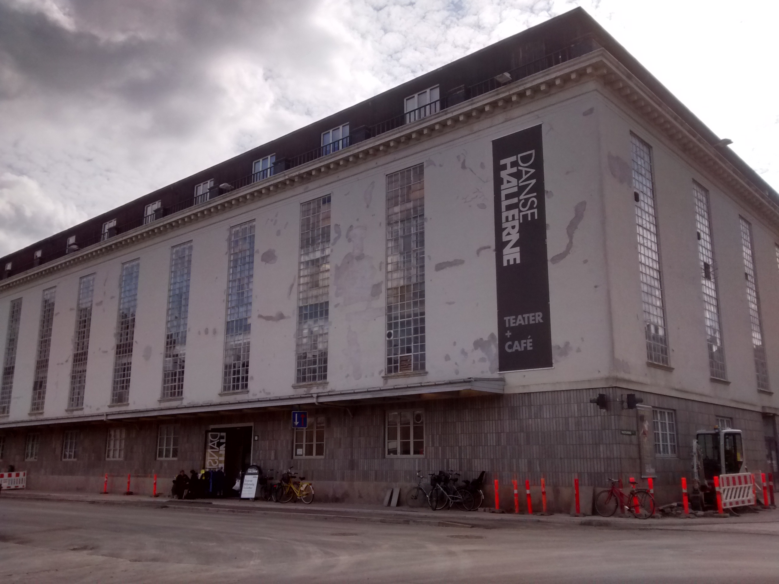 Tap E in Copenhagen.